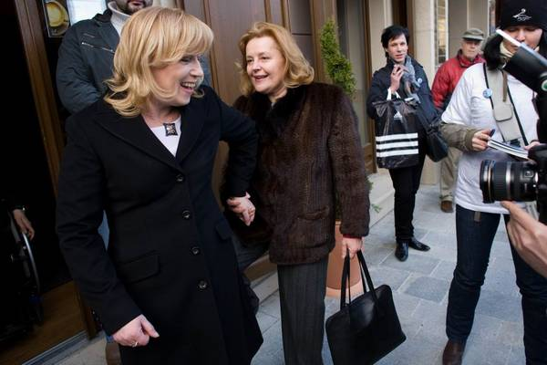 Hráme za Ivetu, 18. marec 2009, Hviezdoslavovo námestie v Bratislave, S Magdou Vášáryovou